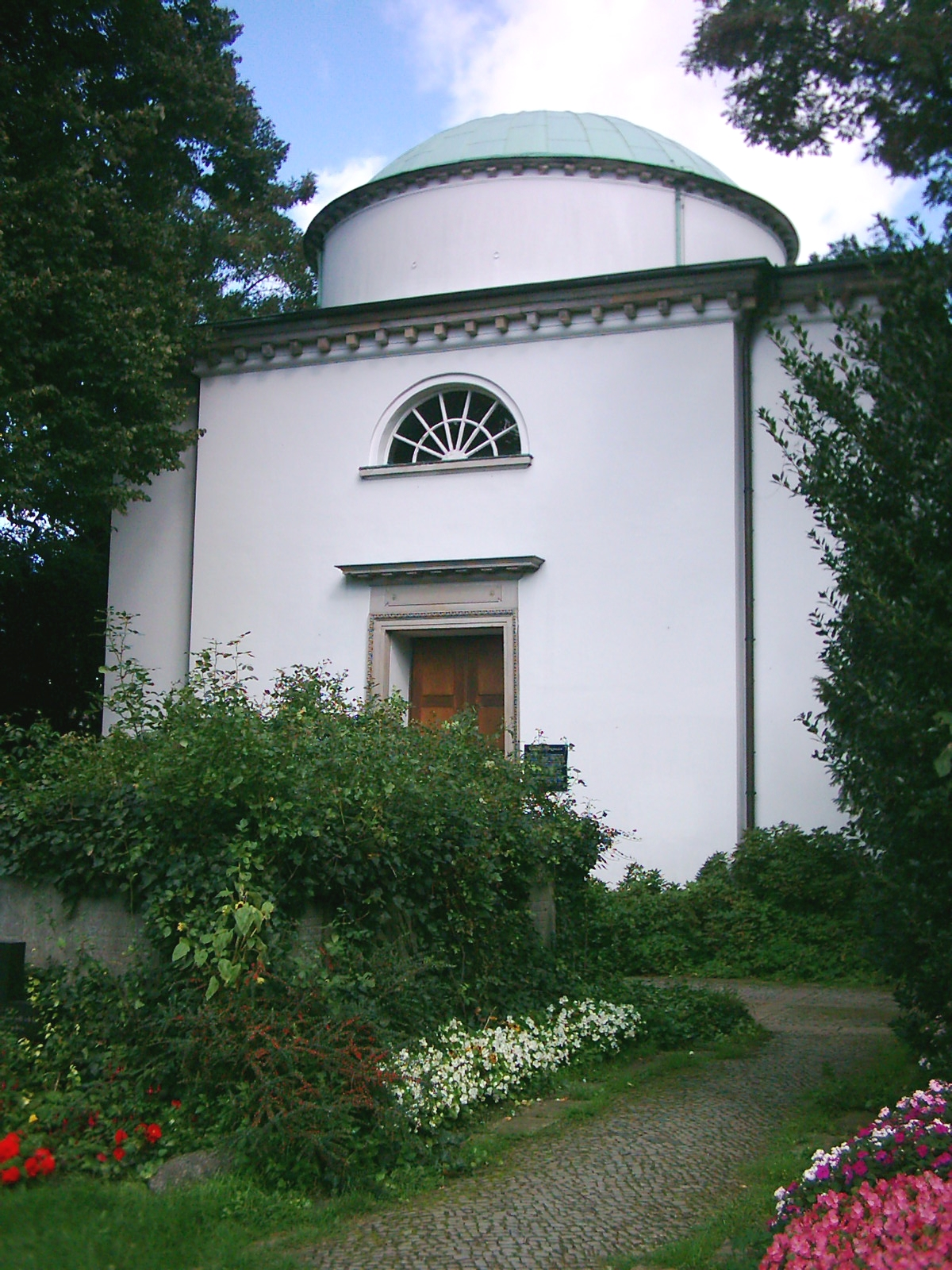 Mausoleum Heinrich Carl von Schimmelmanns (1724-1782), Hamburg-Wandsbek. Siehe auch Image:Schimmelmann Mausoleum Hamburg-Wandsbek Tafel.jpg This is the photograph of an architectural monument. It is part of the list of cultural monuments of Hamburg, no. 190